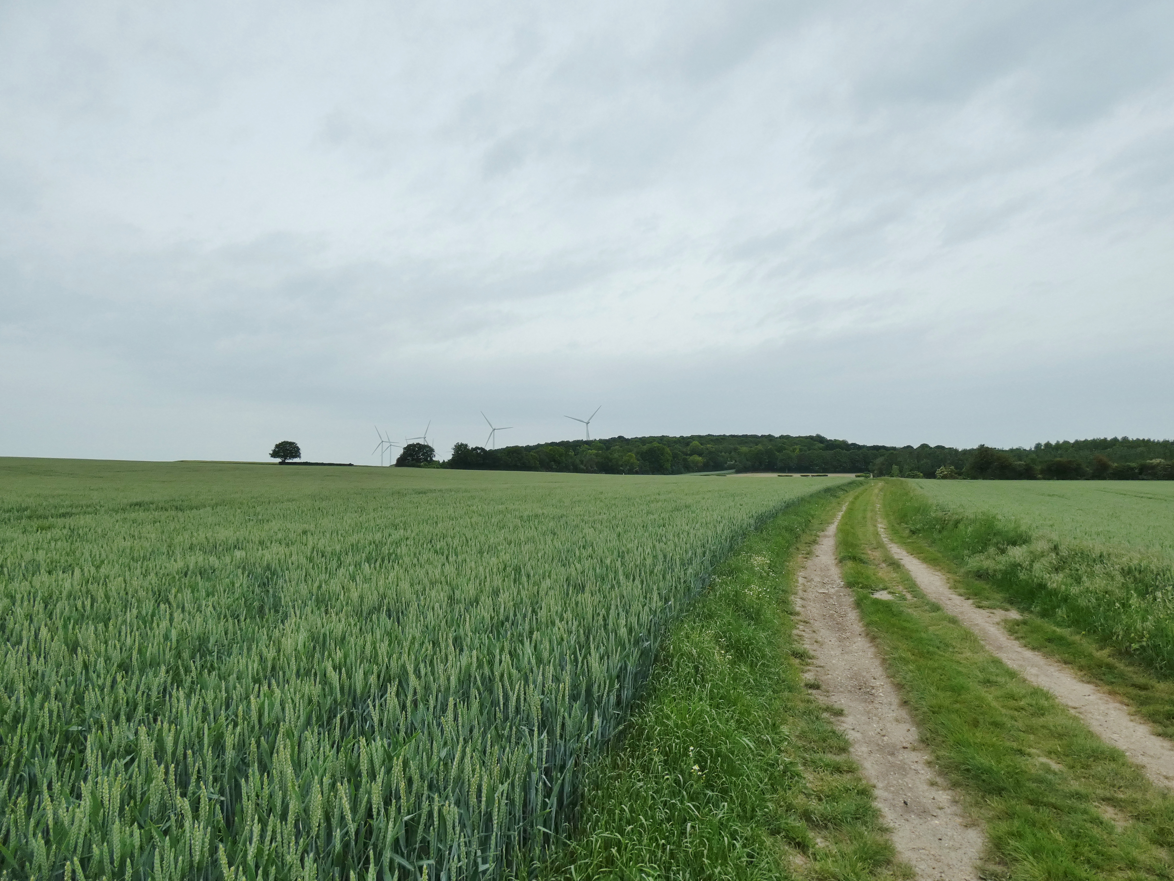 Le sentier de Grande Randonnée 124 au lieu-dit "La Pièce de Wariville"